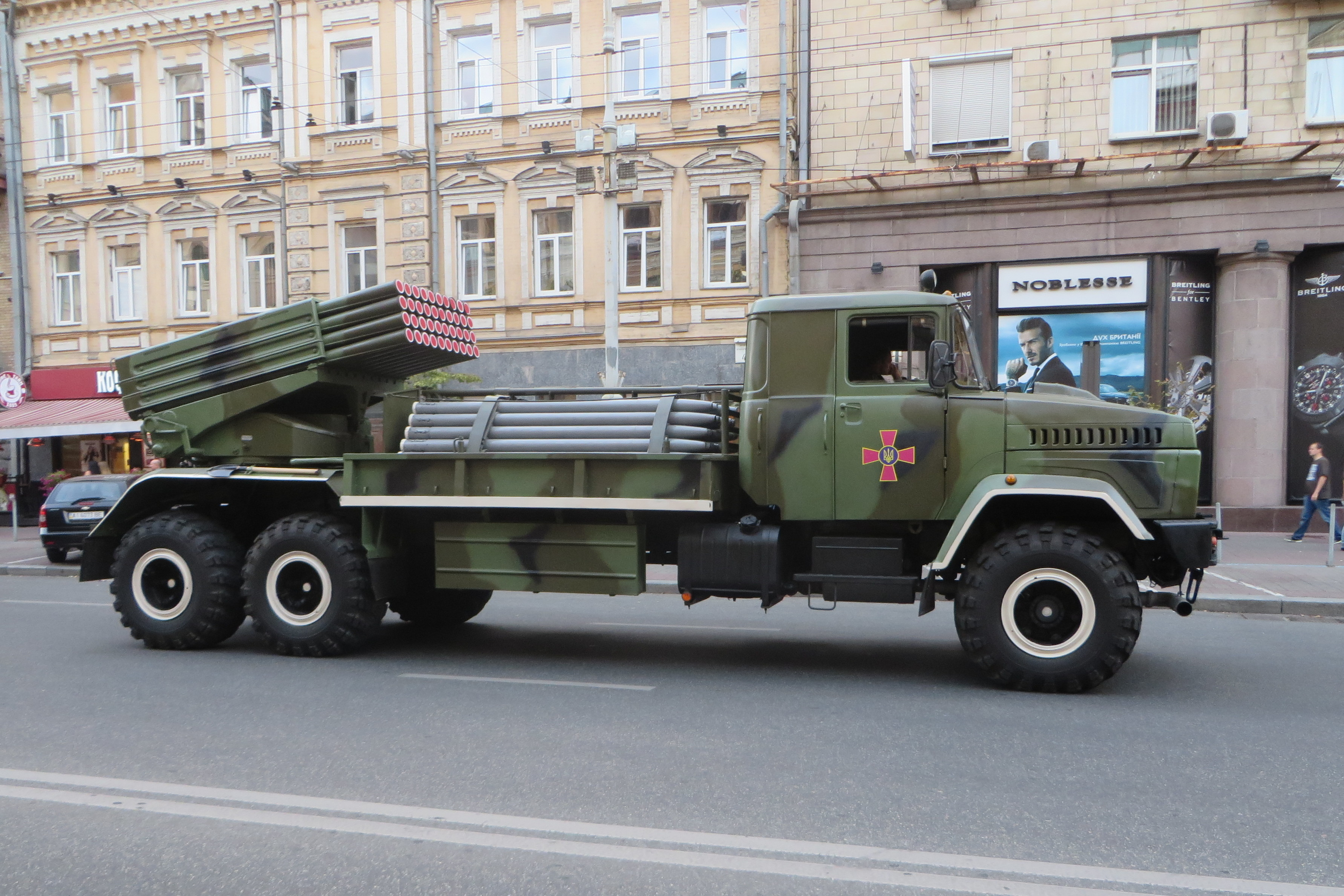 Українські системи залпового ракетного вогню Бастіон-02 під час тренувального маршу перед парадом на День незалежності, 22 серпня 2014 року, Київ, Україна.